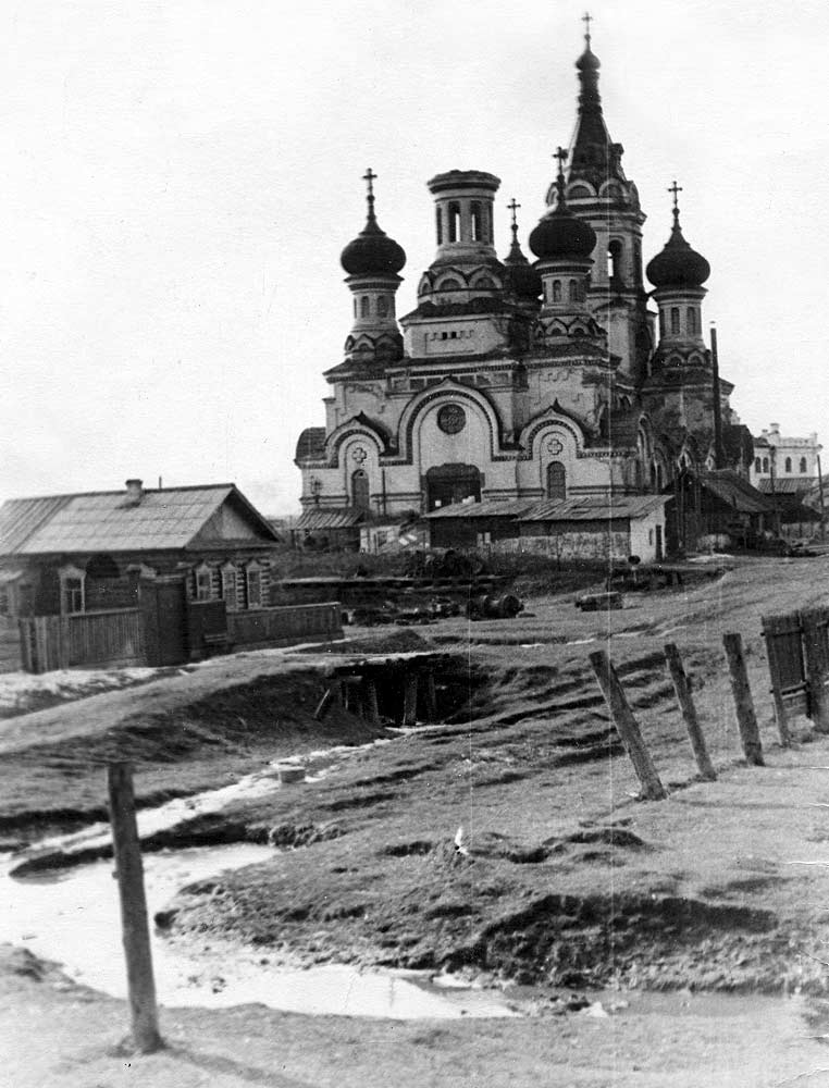 г. Иркутск. Князе-Владимирская церковь разрушенная в 1950-е годы, ныне восстановлена